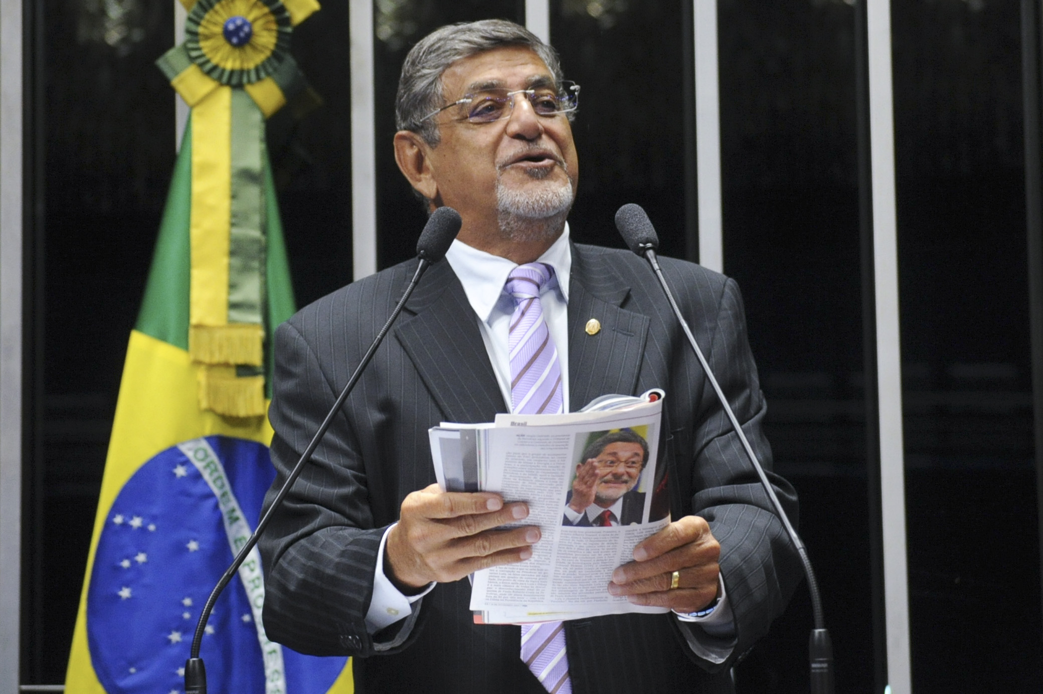 Plenário do Senado Federal durante sessão deliberativa ordinária. Em discurso, senador Mario Couto (PSDB-PA). Foto: Geraldo Magela/Agência Senado